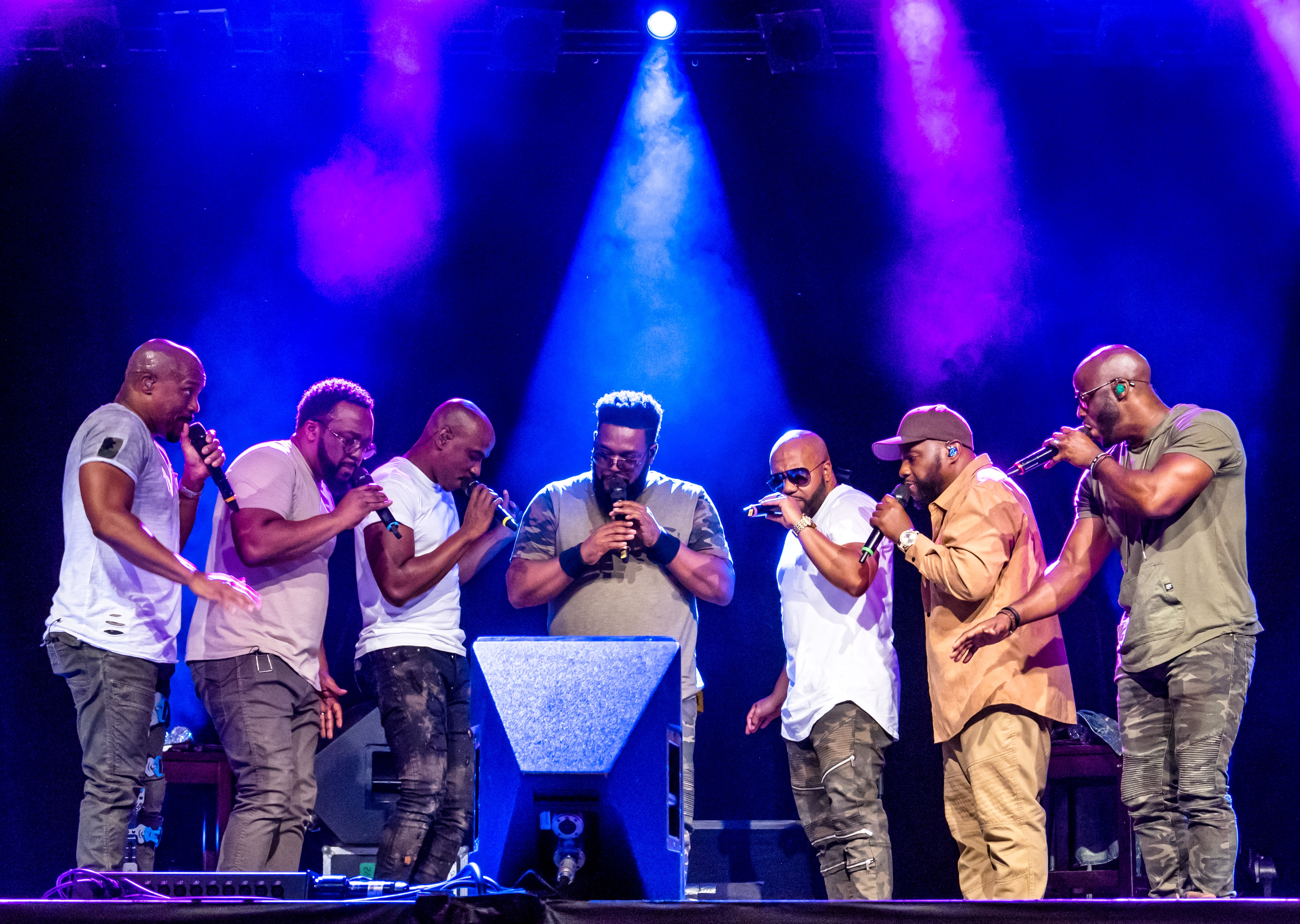 Bilder vom Zelt Musik Festival 2018 in Freiburg im Breisgau Auftritt Naturally 7 am 24. Juli 2018 im Zirkuszelt "A capella Nacht"